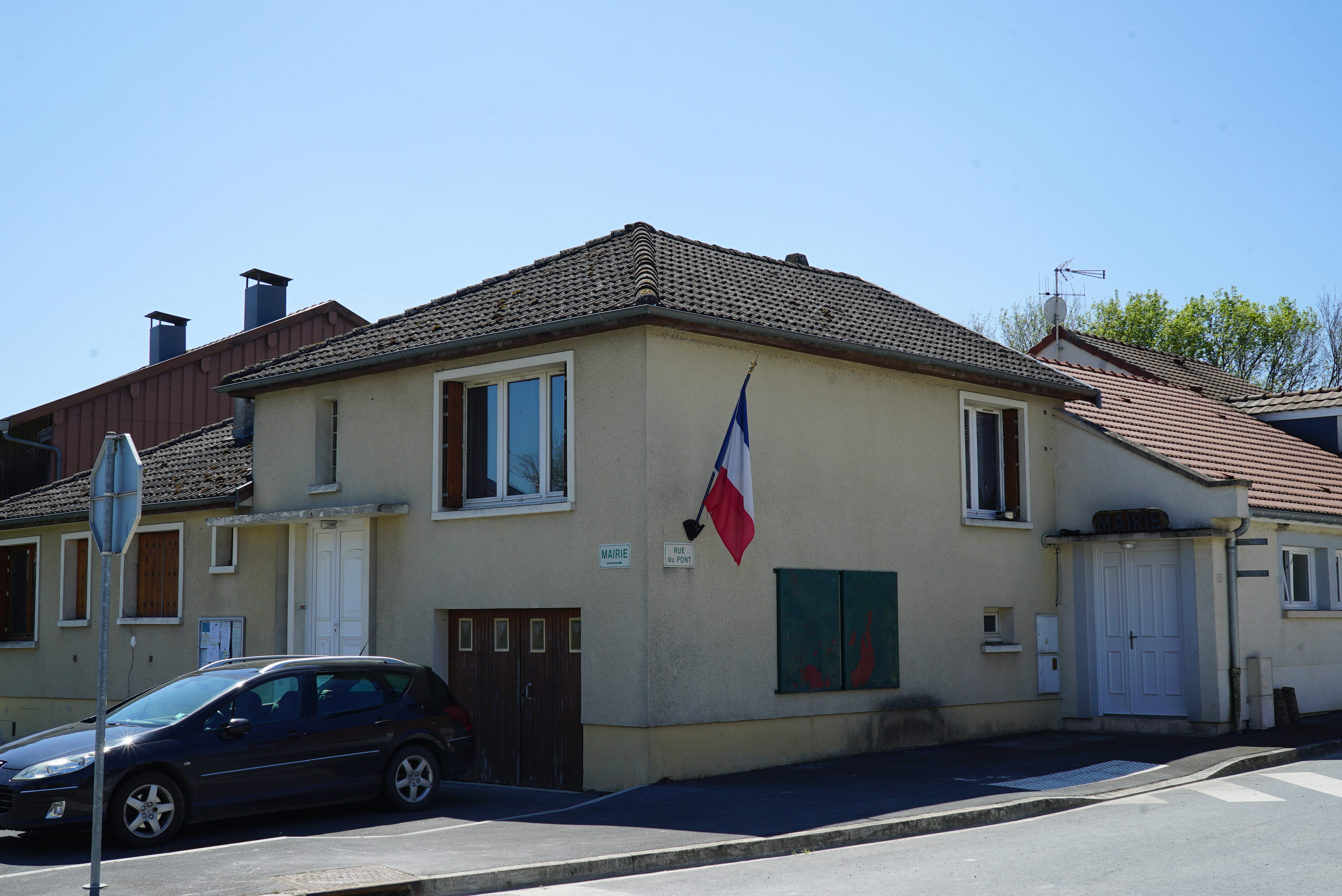 image de cf. titre.